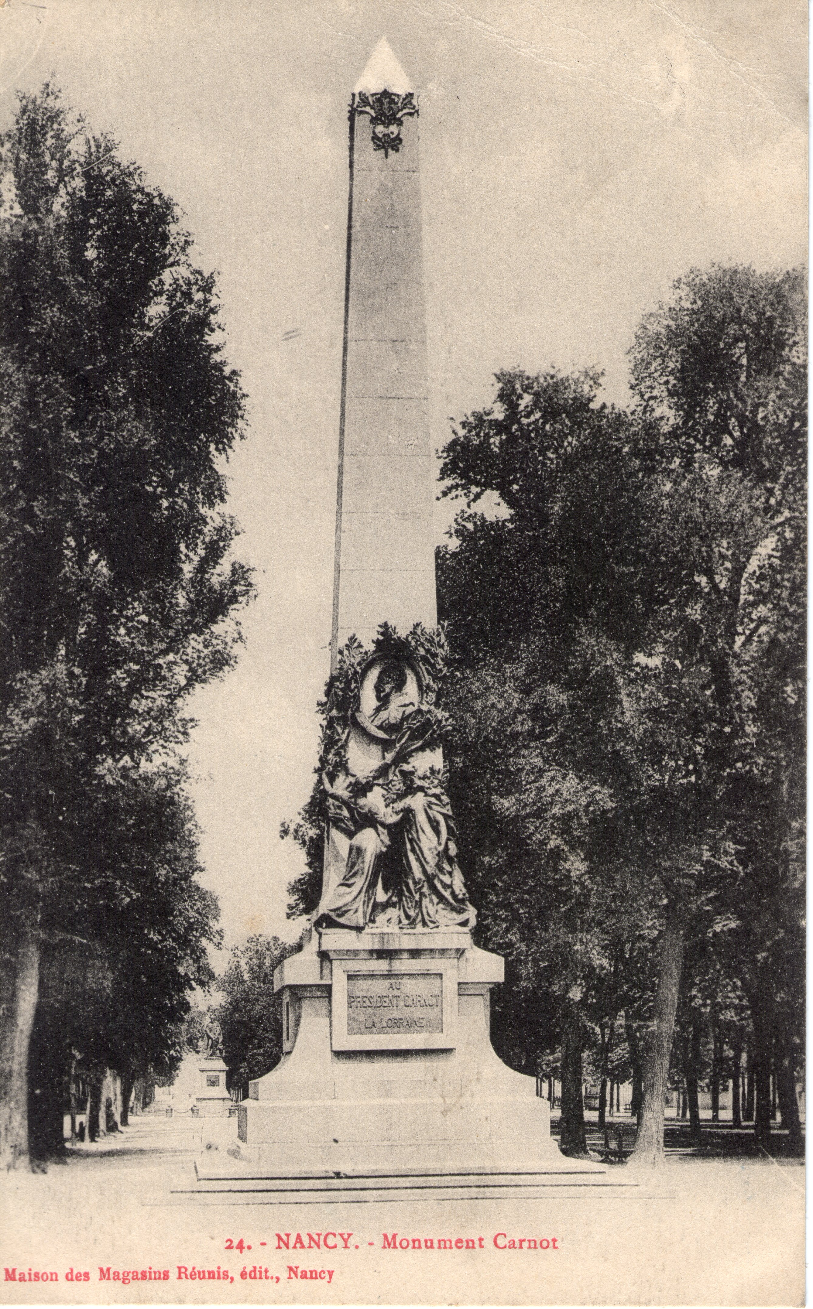 Obelisk Nancy